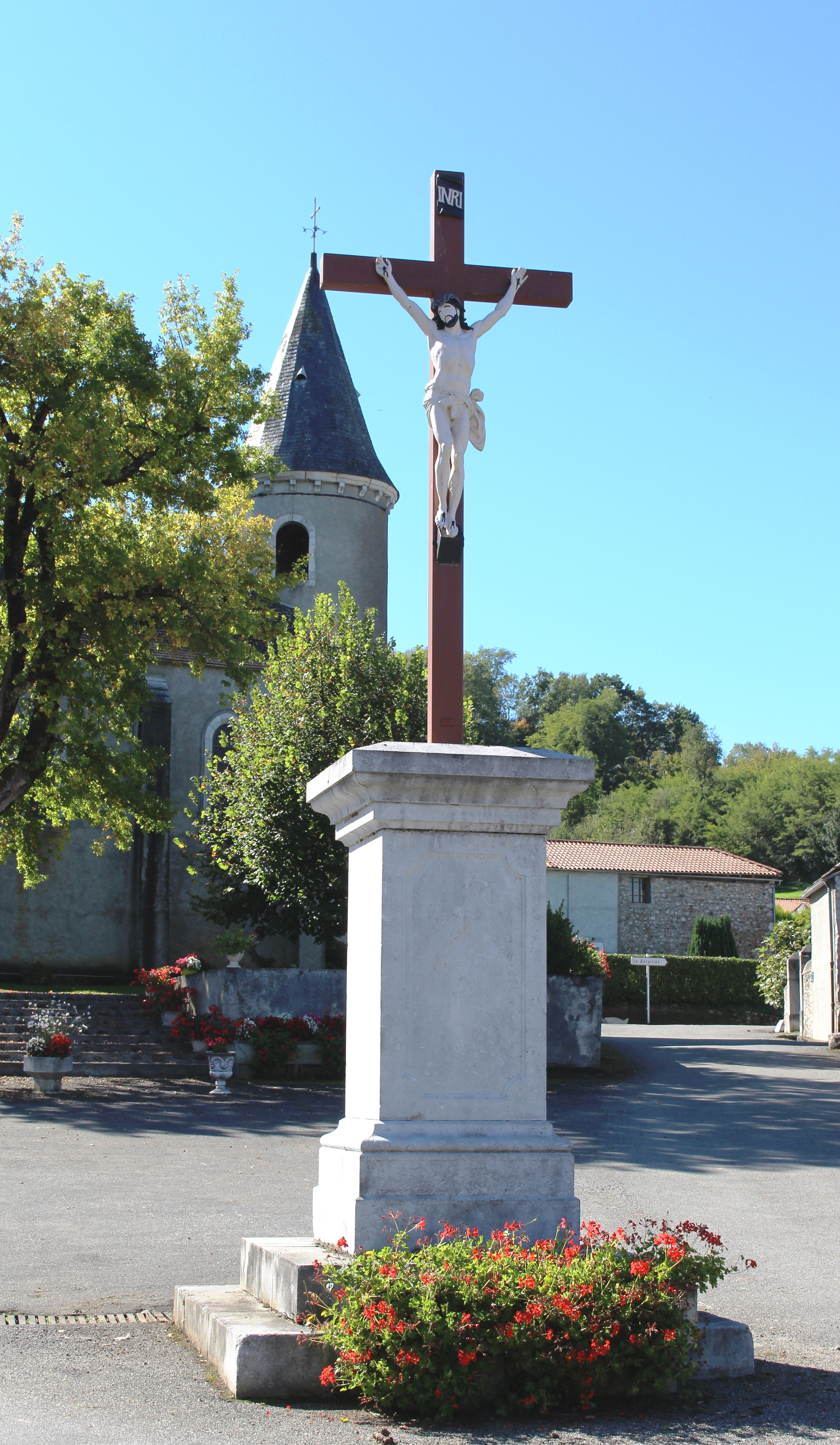 Croix de Montégut (Hautes-Pyrénées)